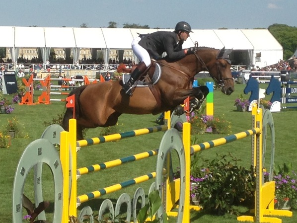 Patrice Delaveau et Orient Express*HDC dans le Grand Prix GCT de Chantilly 2013